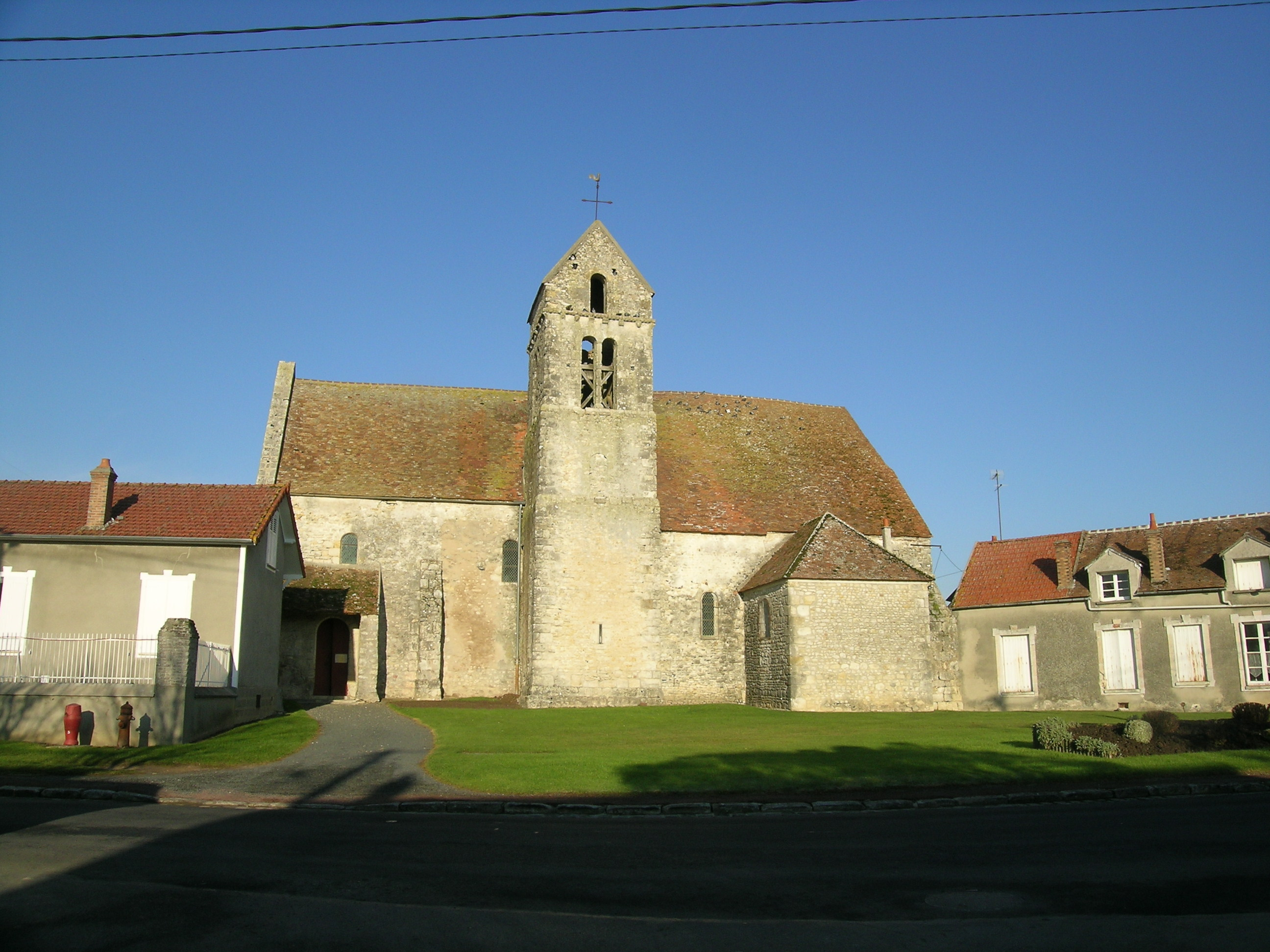 l'église Notre-Dame-de-l'Assomption d'Amponville. (département de la Seine-et-Marne, région Île-de-France).